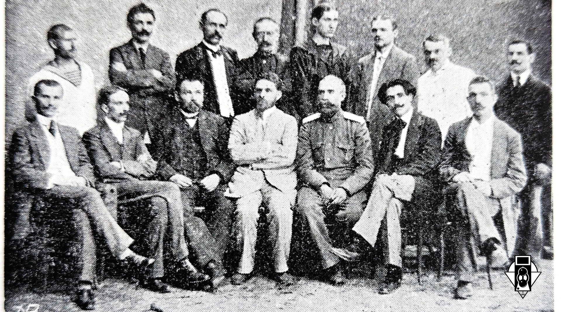 Перші літні курси фотографії при Одеському фотографічному товаристві у 1912 році